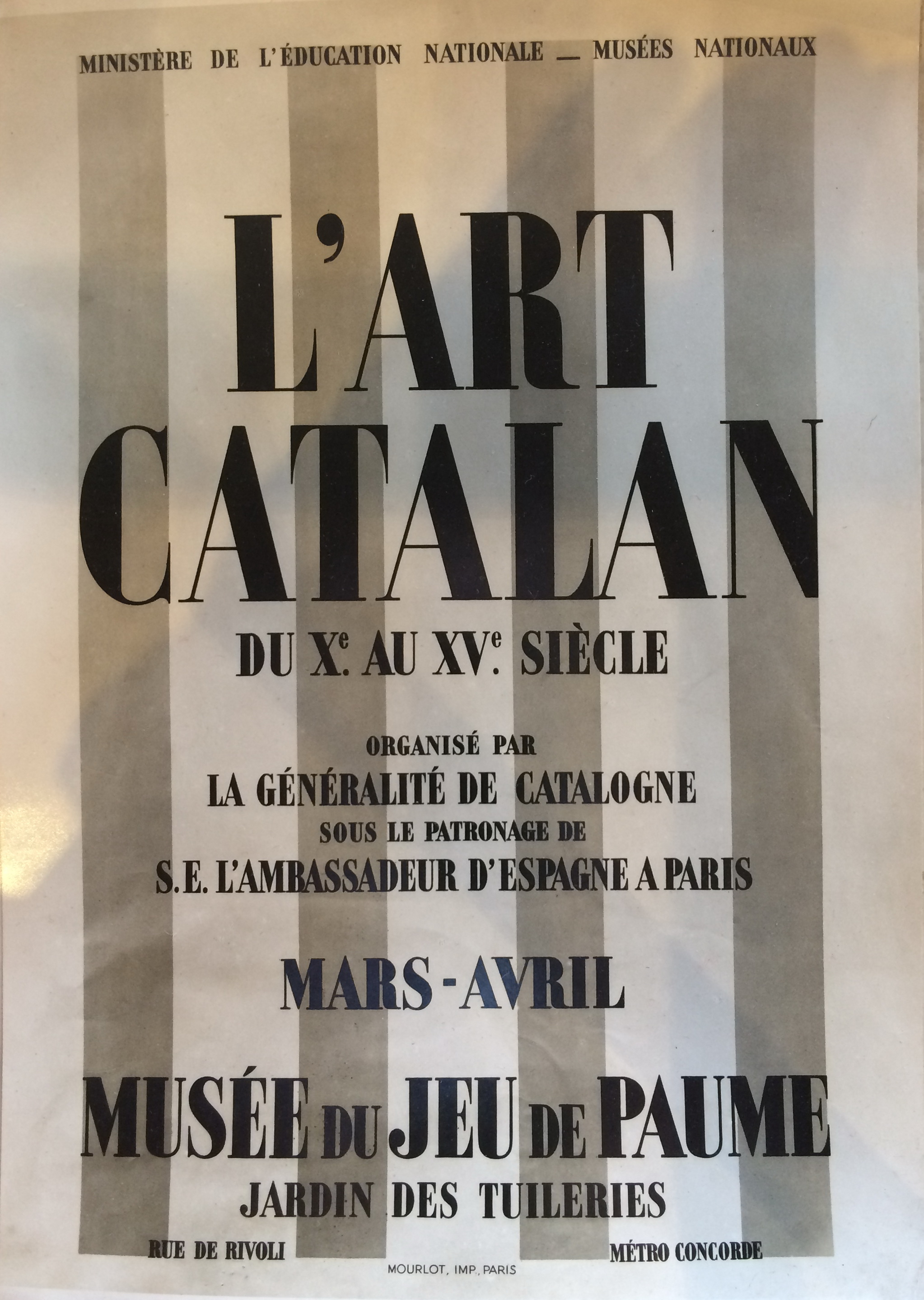 Futlletó anunci de l'exposició organitzada per Joaquim Folch i Torres el 1936 per traslladar a París el patrimoni artístic del Museu Nacional d'Art de Catalunya.